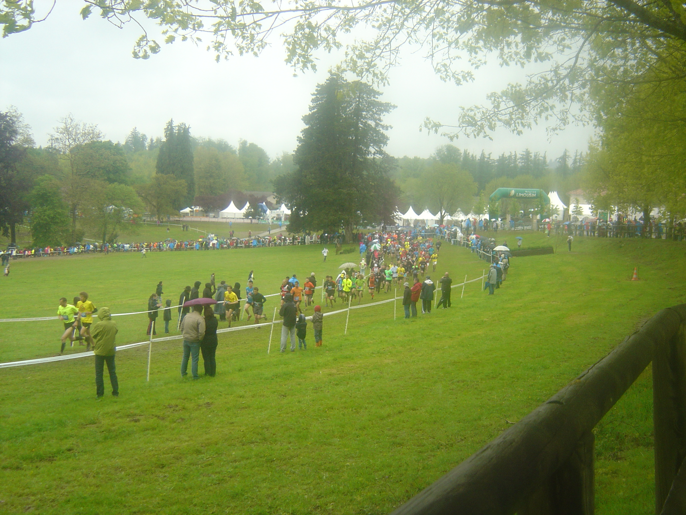 Tour de la prairie du centre équestre de Muret sur le premier kilomètre de la course de 10 km des Gendarmes et voleurs de temps 2013